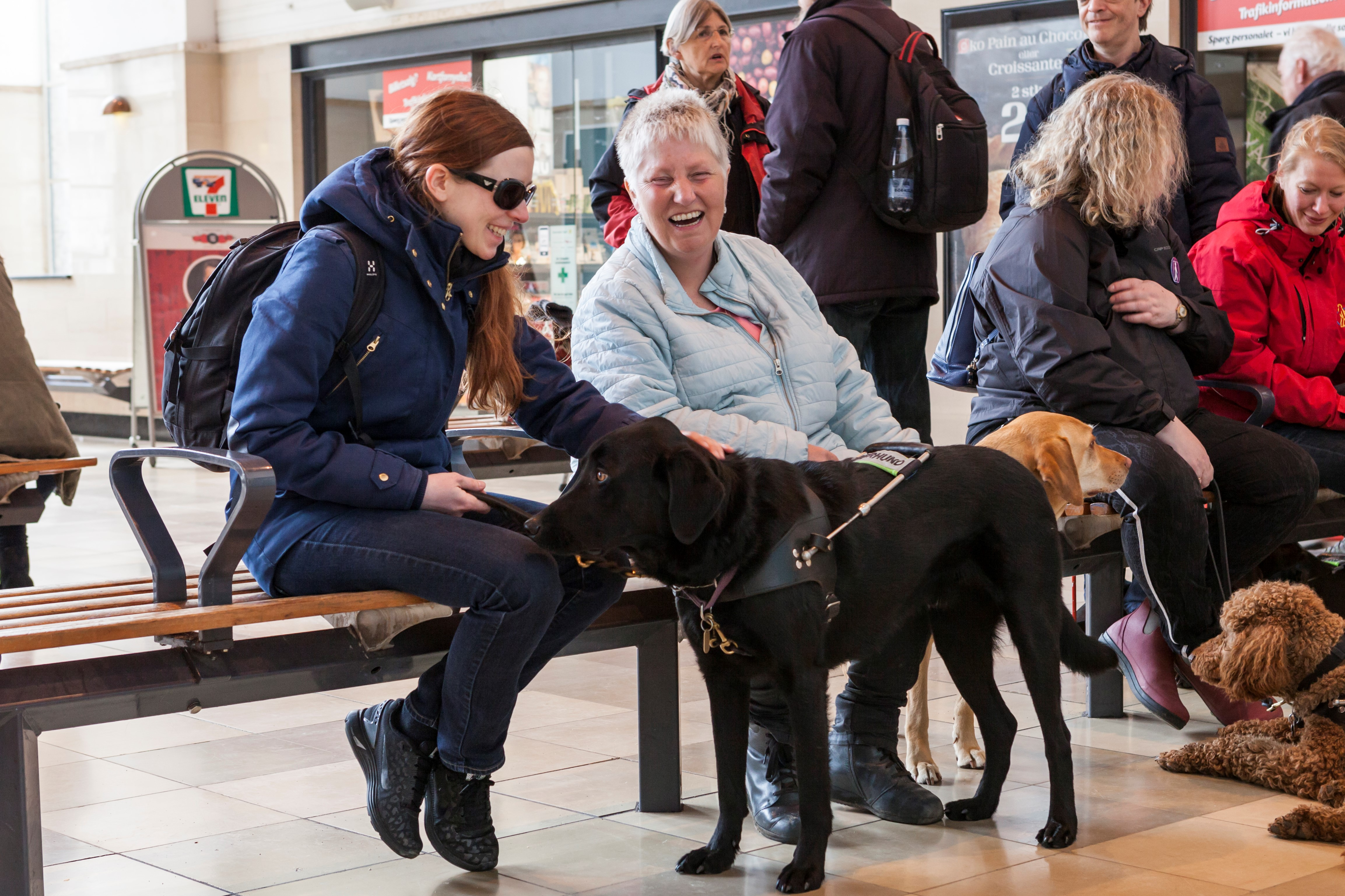 Brugere og deres førerhunde fra Brugernes FørerhundeOrdning